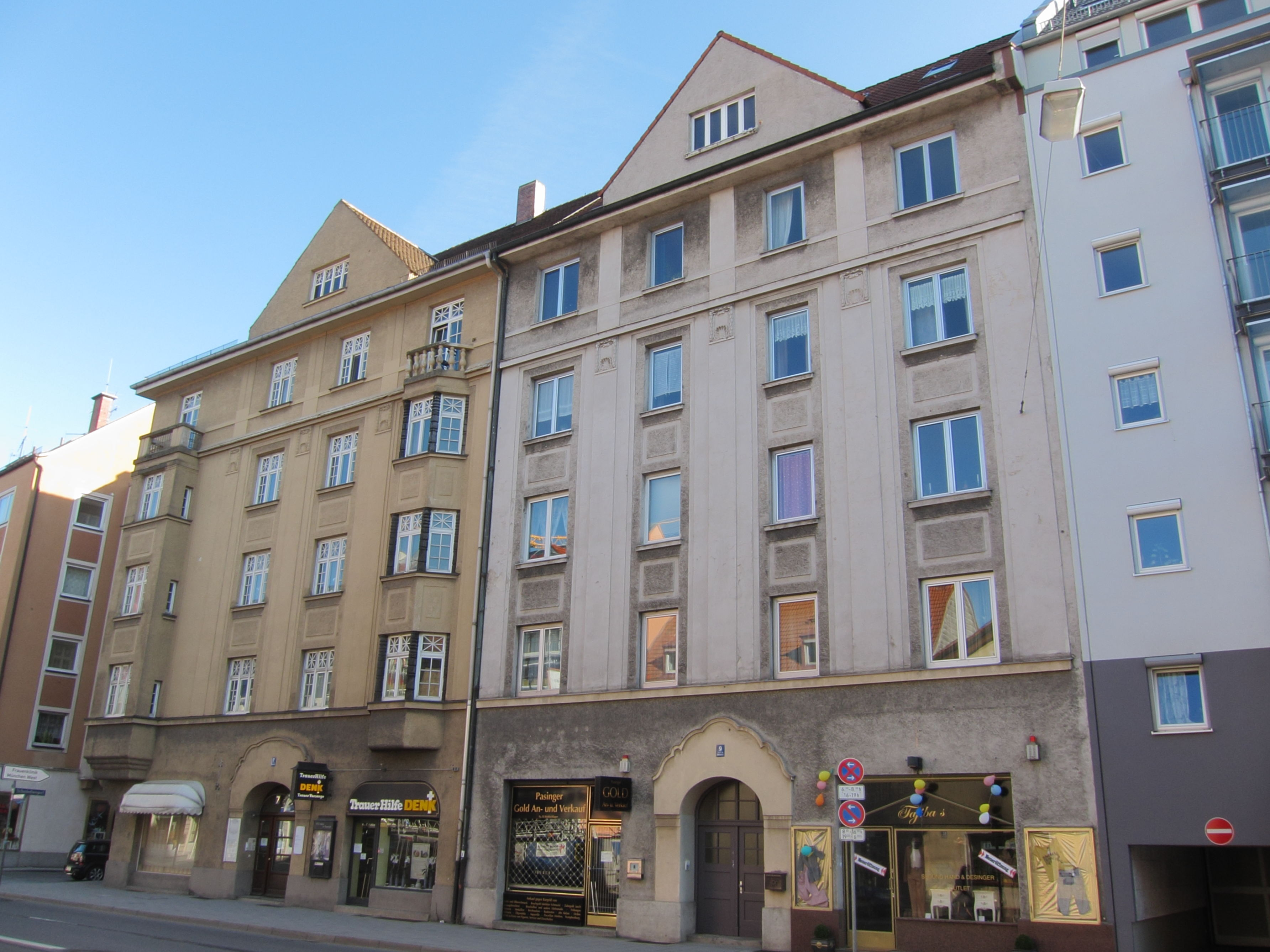 Bodenseestraße 7/9; Doppelmietshaus, neuklassizistisch, 1915 von Alban Schindlbeck.